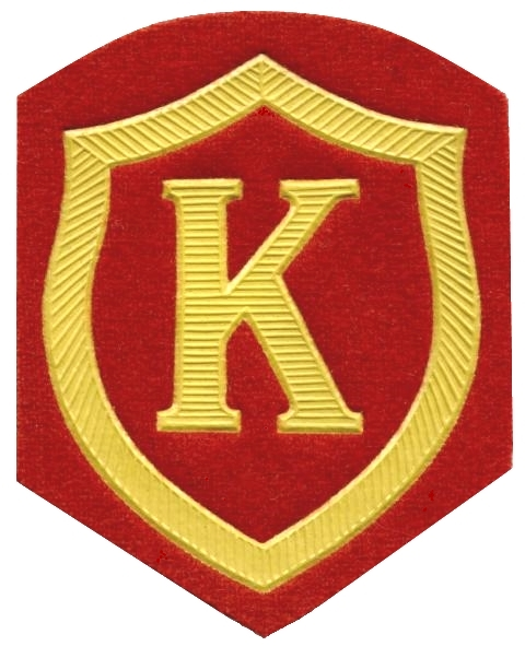 Эмблема подразделений комендатуры Вооружённых Сил СССР